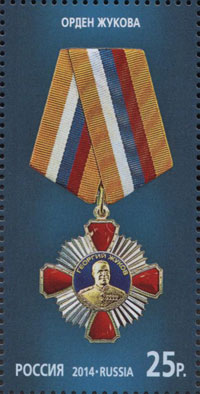 Серия "Государственные награды Российской Федерации"